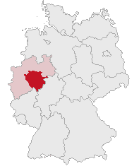 Regierungsbezirk Arnsberg, North Rhine-Westphalia, Germany